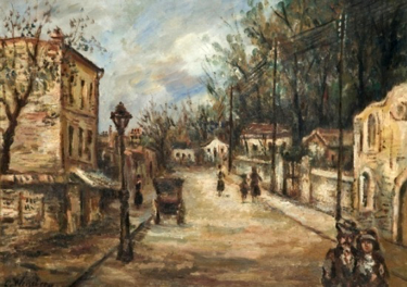 Tableau La Rue à Cachan avec réverbère, de Léon Weissberg